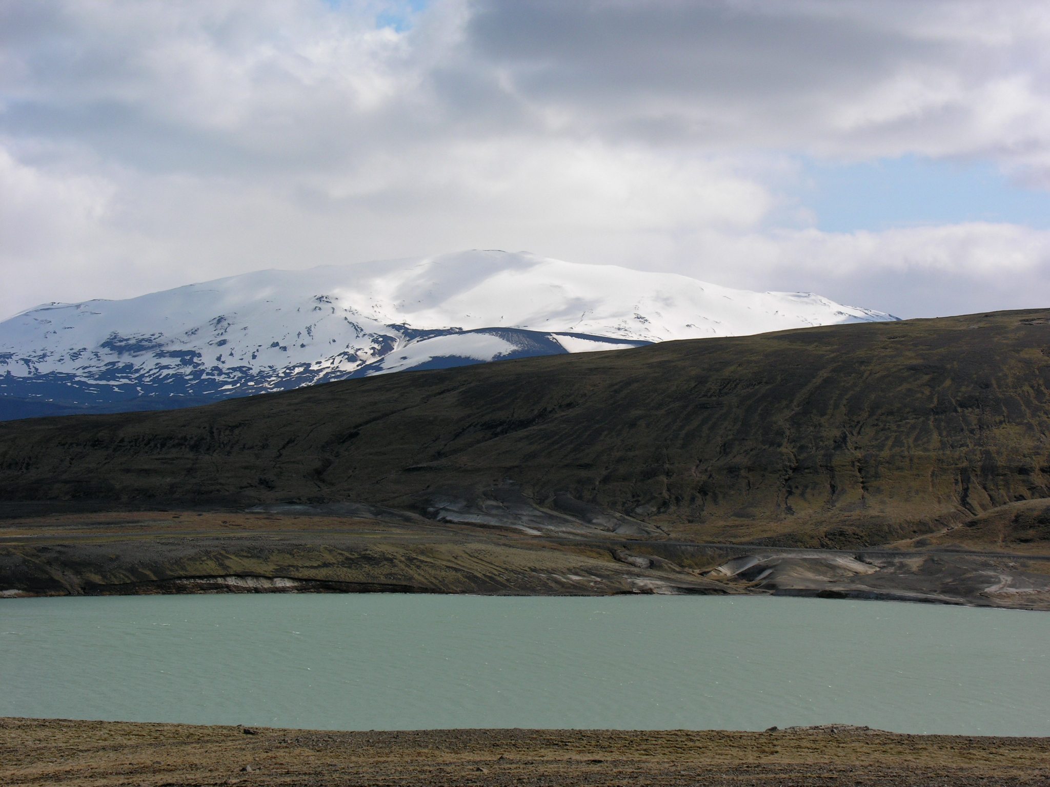 Iceland, Þjórsá and Hekla